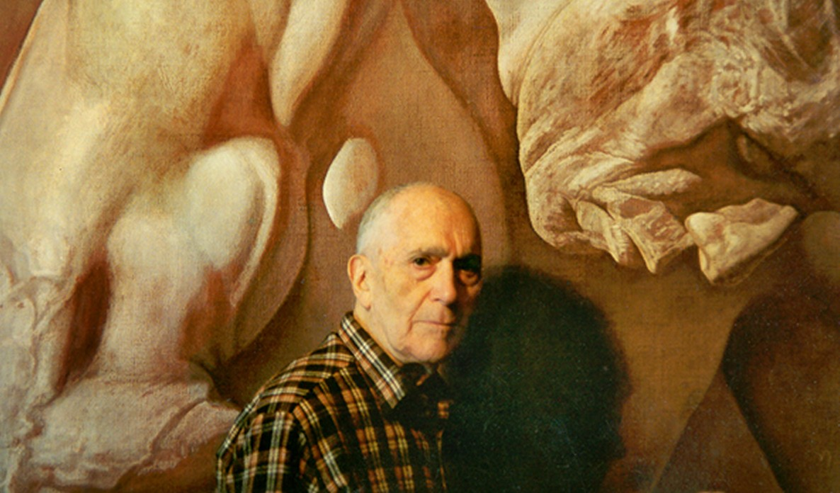 Benito Prieto Coussent